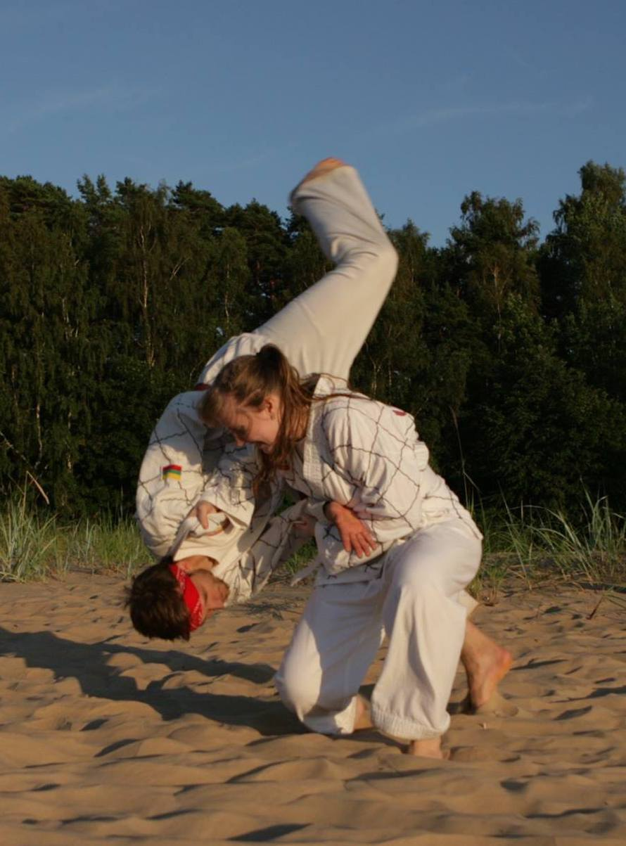 WonHwaDo mėtimas atliktas 2014-07-19 prie Baltijos jūros.